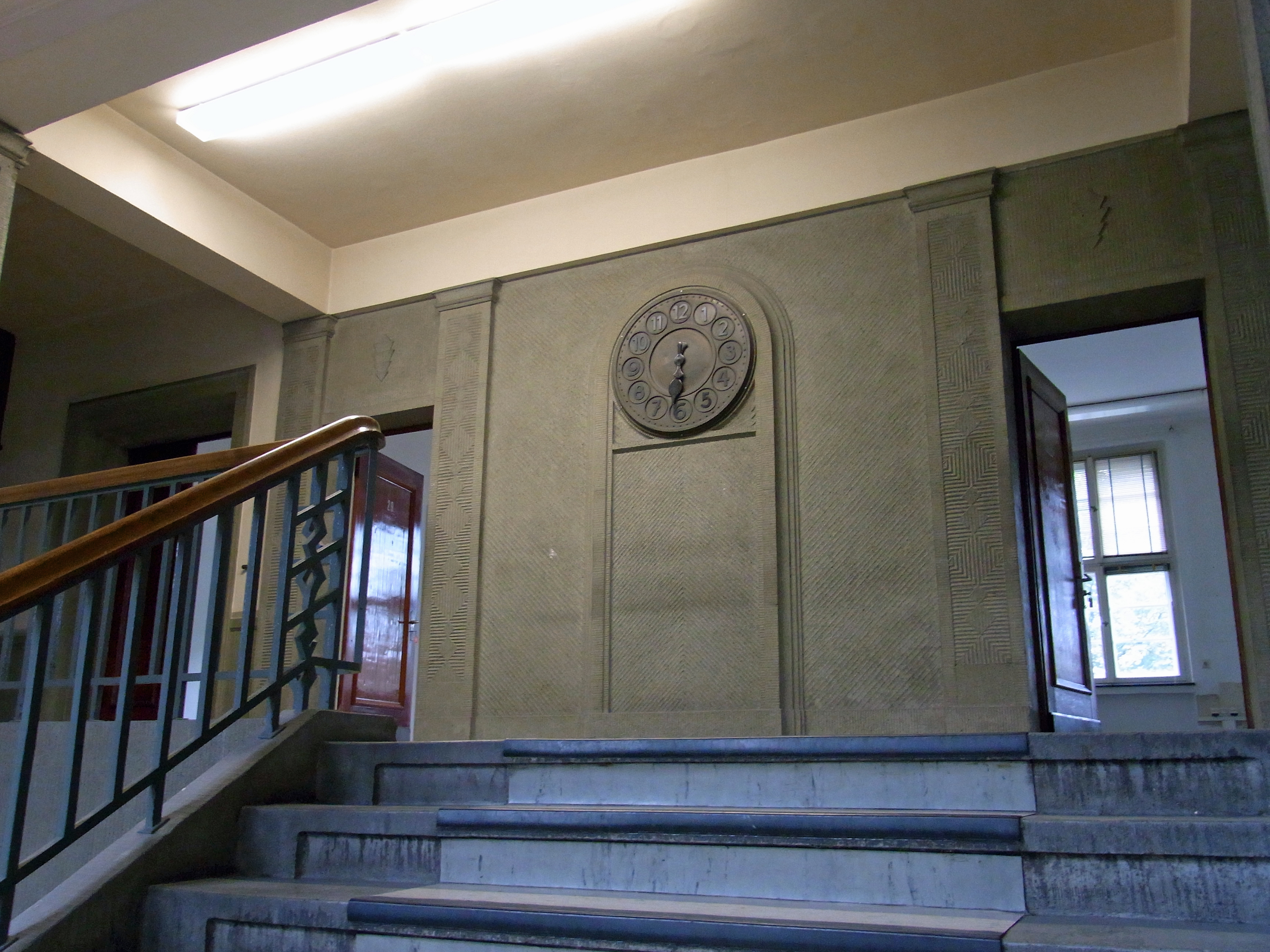 Tag des offenen Denkmals 2010: Hagen Ehemaliges Haus der Ruhrkohle